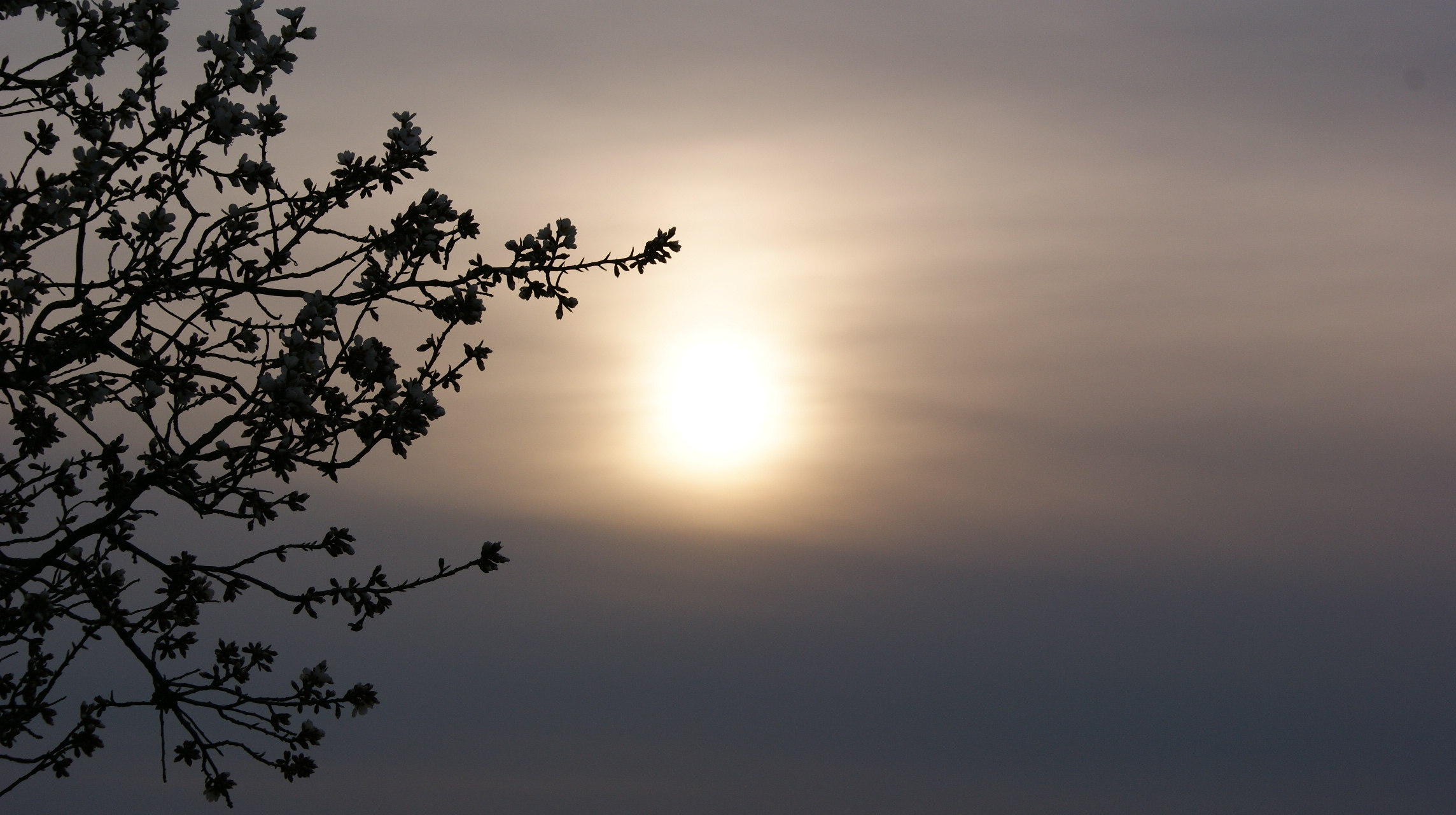 ejemplo de enfoque horizontal